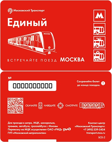 Единый билет Московского городского транспорта со стилизованным изображением электропоезда метро 81-765 Москва